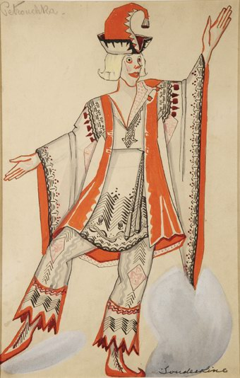 Эскиз костюма, "Петрушка". Коллекция Н.Д. Лобанова-Ростовского